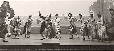 Балет "Водяной столб" на музыку Вяйнё Райтио